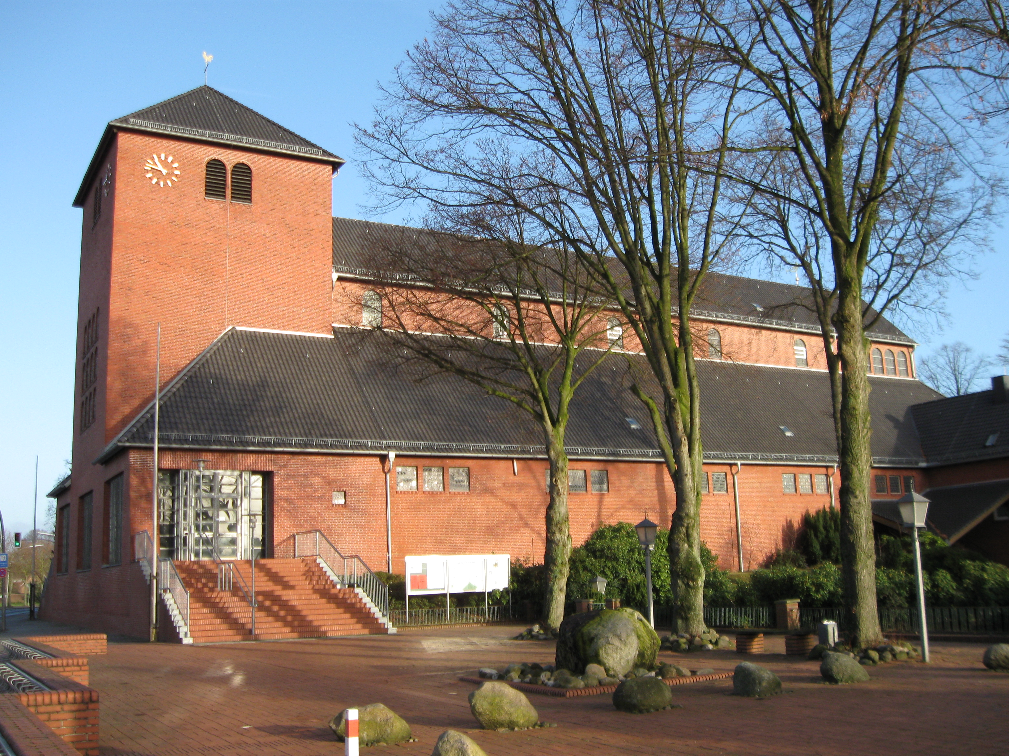 St.-Josef-Basilika Lingen (Ems), Blick auf die Südseite